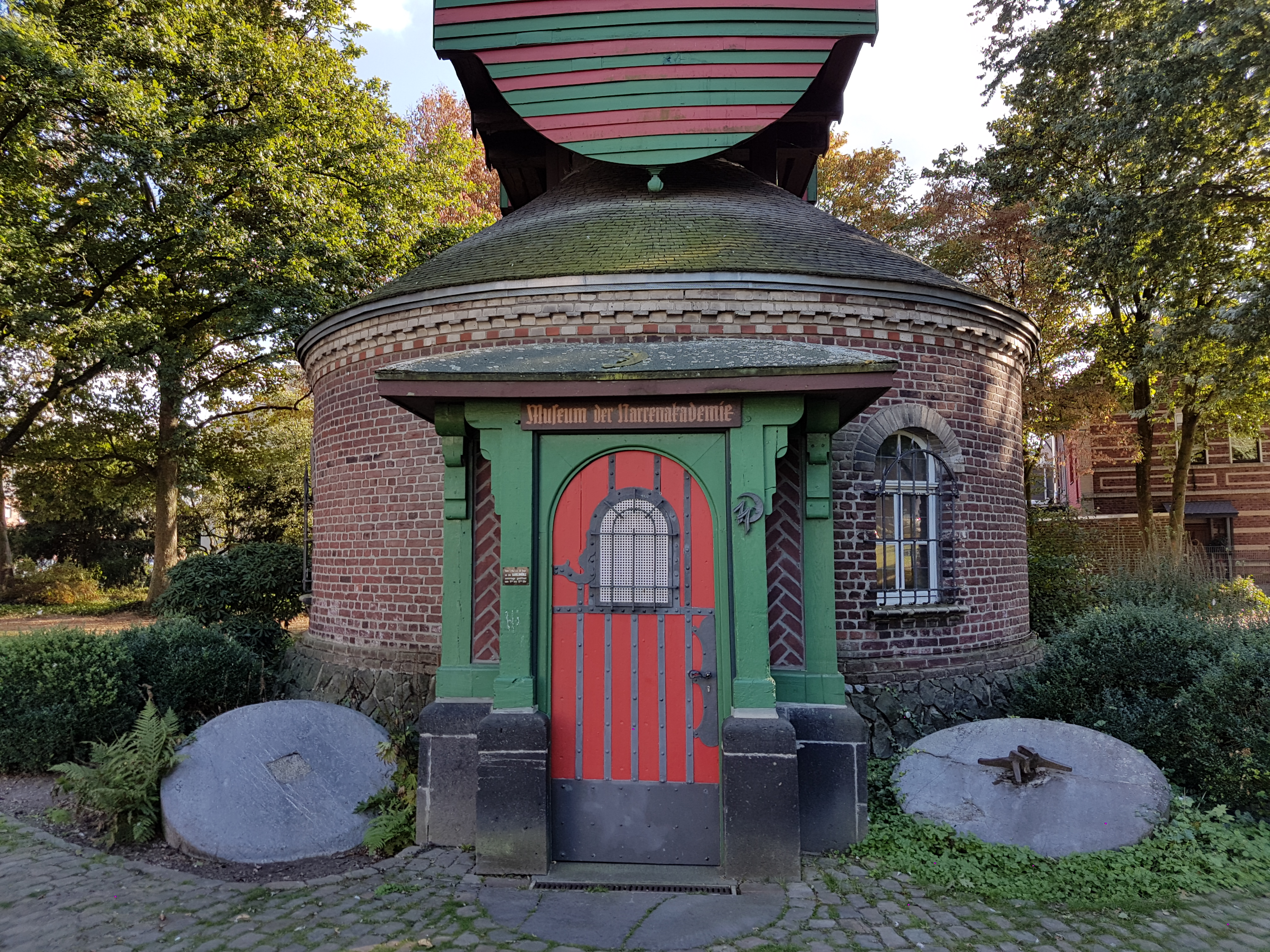 Narrenmühle in Viersen Dülken Eingang mit Mühlsteinen - Frontalsicht mit Museumseingang